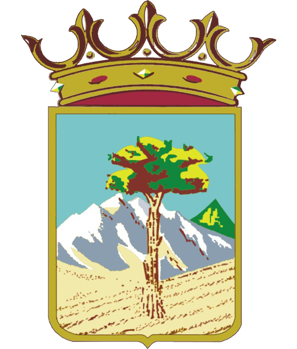 coat of arms